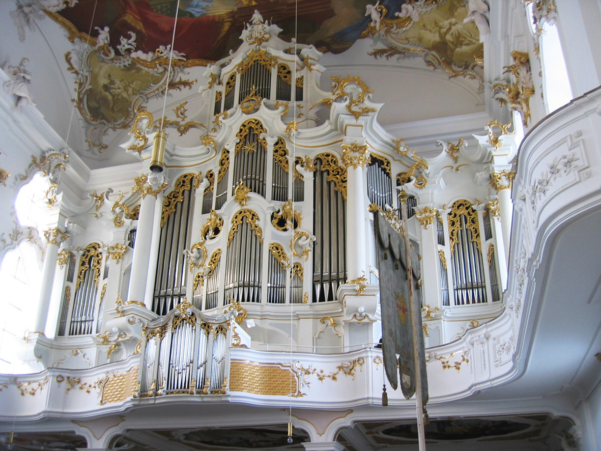 Orgel im Kloster Roggenburg, Landkreis Neu-Ulm, Bayern Prospekt: Georg Friedrich Schmahl, Ulm, 1761 Werk: Gerhard Schmid, Kaufbeuren, 1986 Fotograph: Rolf Thum